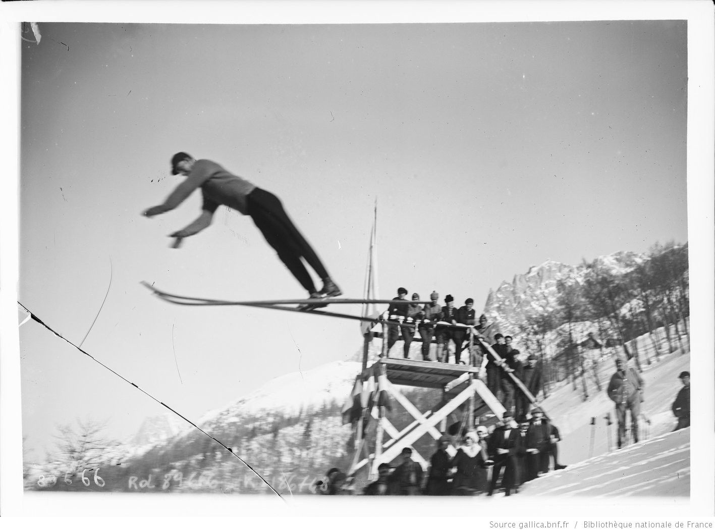 [Jeux olympiques d'hiver de] Chamonix, 2/2/24, Stromstad [saut à ski de l'épreuve du combiné nordique] : [photographie de presse] / [Agence Rol]